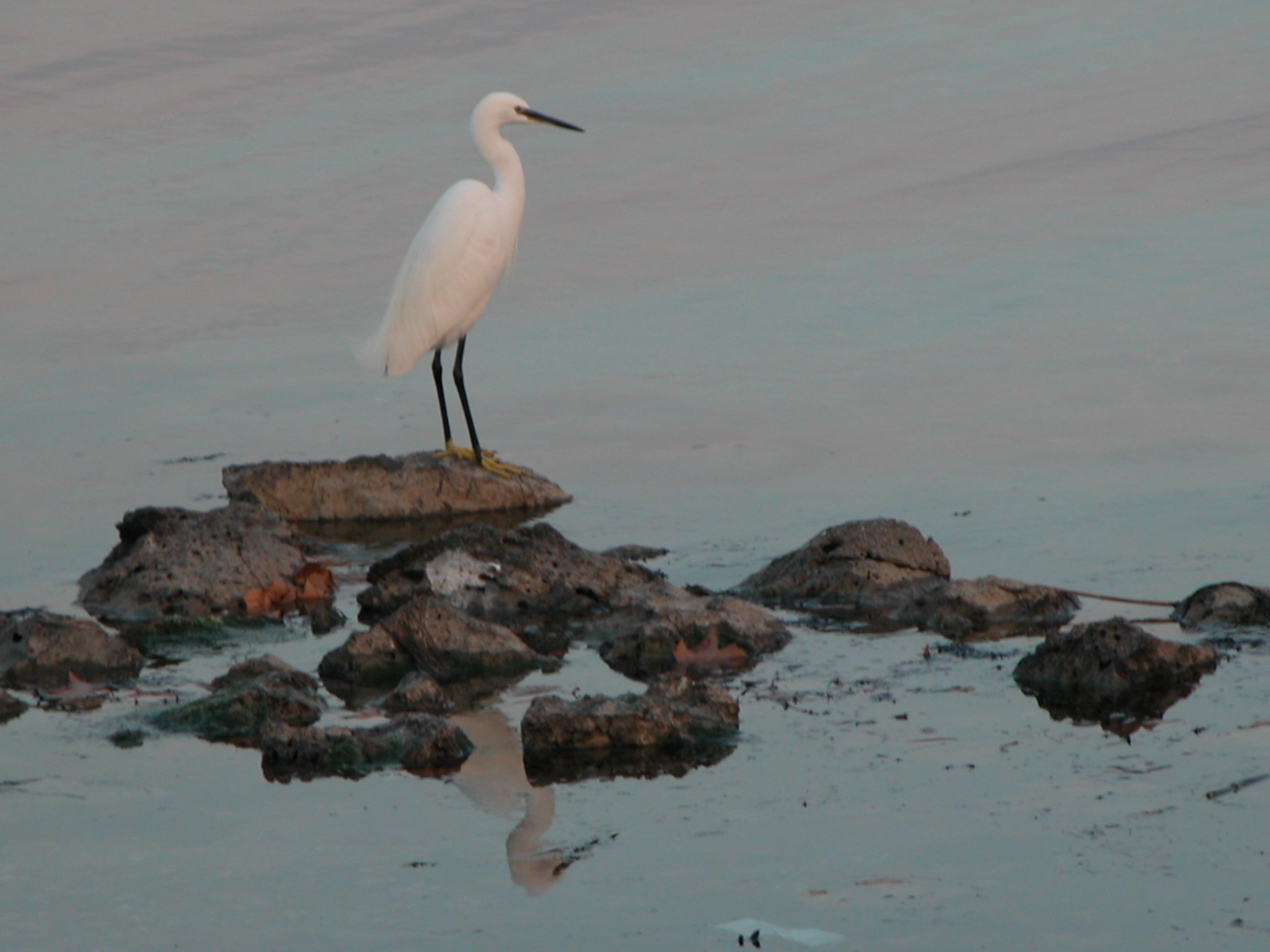 Aigrette (Egretta garzetta) sur les bords de l'Étang de Thau (Marseillan) - Photo personnelle.